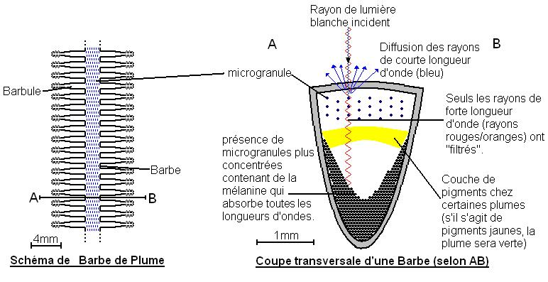 schéma du phénomène de diffusion de Rayleigh dans la plume